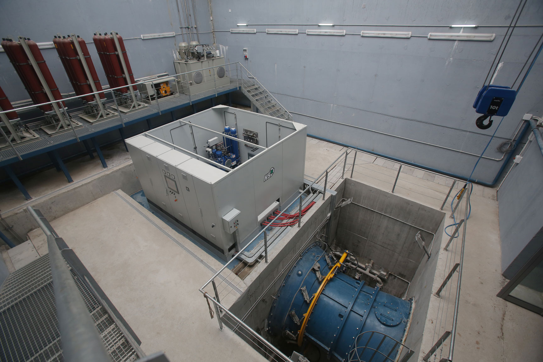 Булб турбина в МВЕЦ Прокопаник